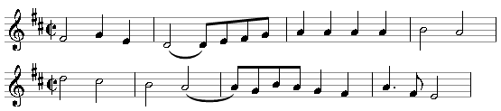 Beschreibung: Thema aus dem ersten Stz von Joseph Haydn Sinfonie Nr. 104 Quelle: Joseph Haydn, Selbst eingespielt Fotograf / Zeichner: Boris Fernbacher 21:59, 2. Feb 2006 (CET) Andere Versionen: == Lizenz des Beispiels ==